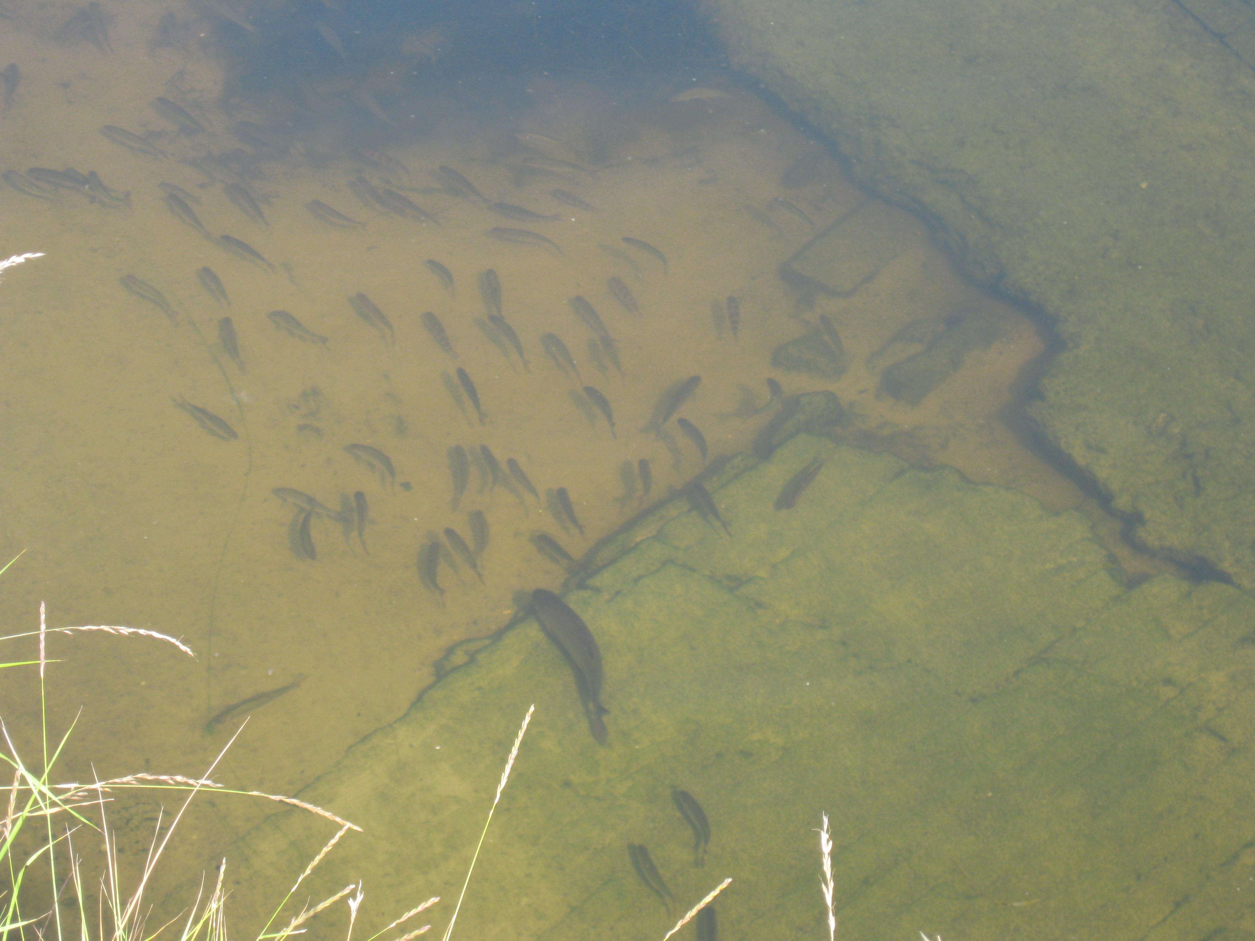 Ein Schwarm kleiner Fischer in einem Graben am Ems-Jade-Kanal